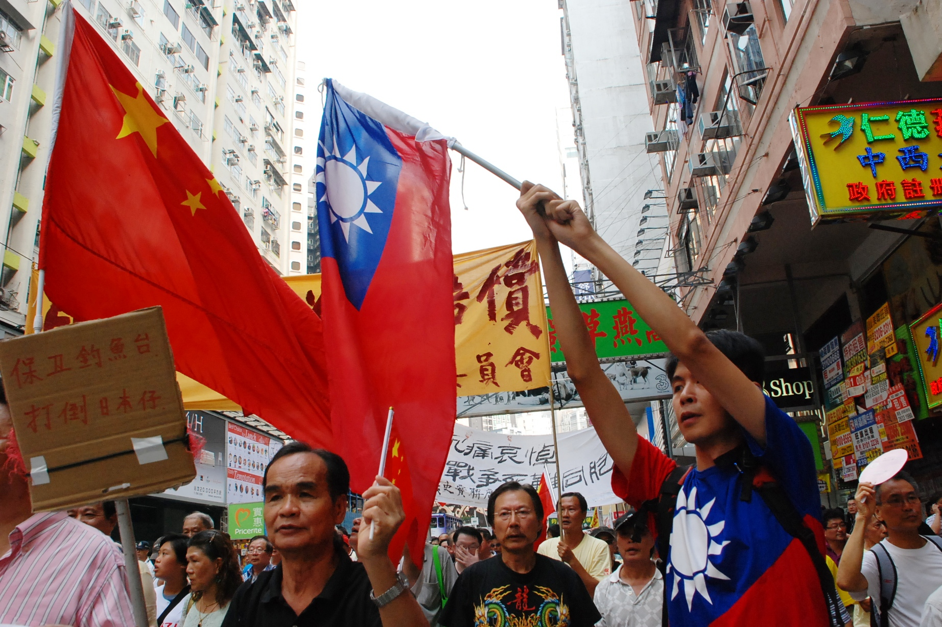 香港保钓游行队伍同时出现两岸的五星红旗及青天白日满地红旗